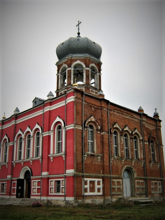 с. Пушкино Добринского района Липецкой области/ Church in the village of Pushkino